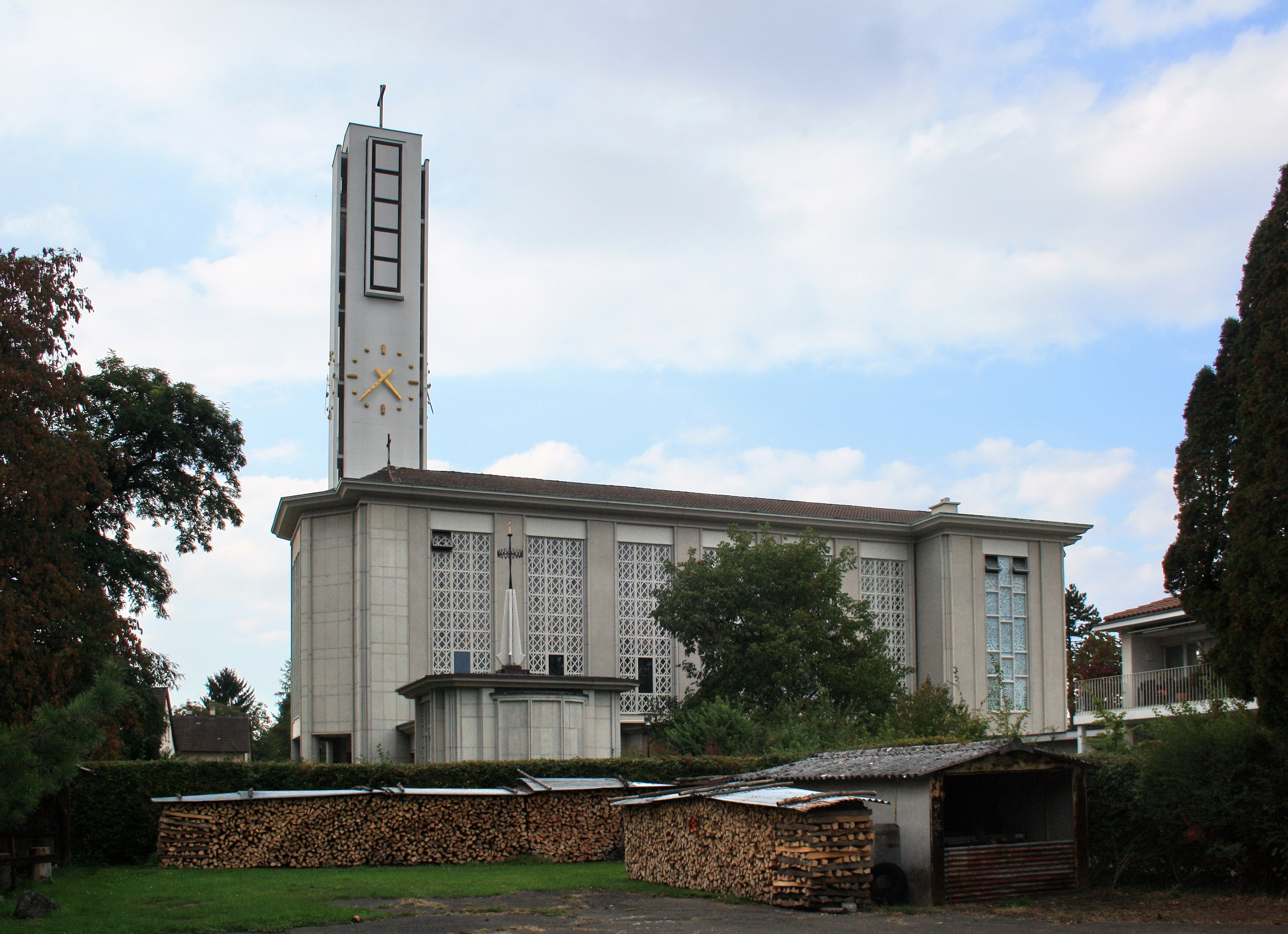 Römisch-katholische Kirche in Dübendorf (Switzerland)